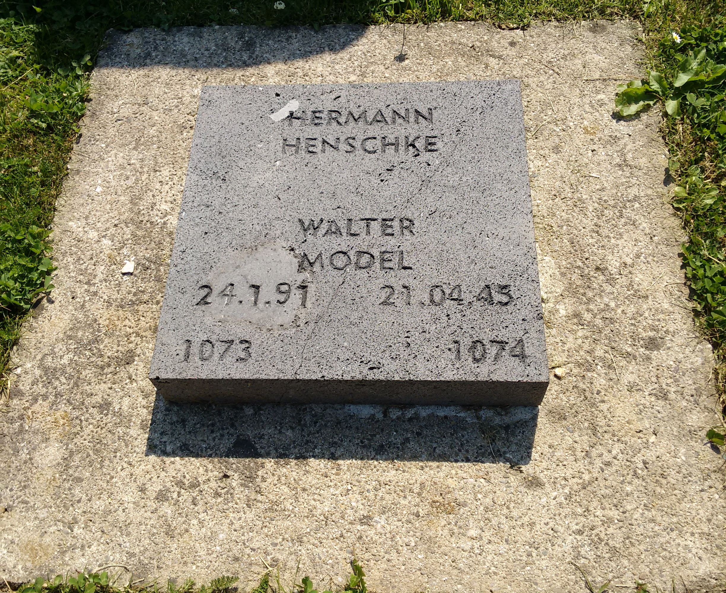 Der Grabstein Nummer 1074 auf dem Soldatenfriedhof Vossenack trägt einen prominenten Namen: Hier ruht Walter Model.